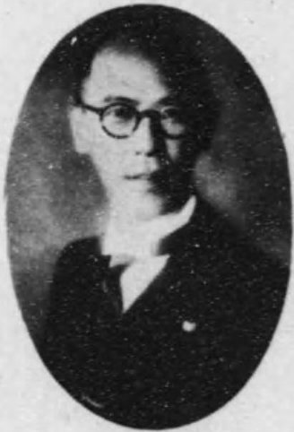 児玉九一（1893-1960）